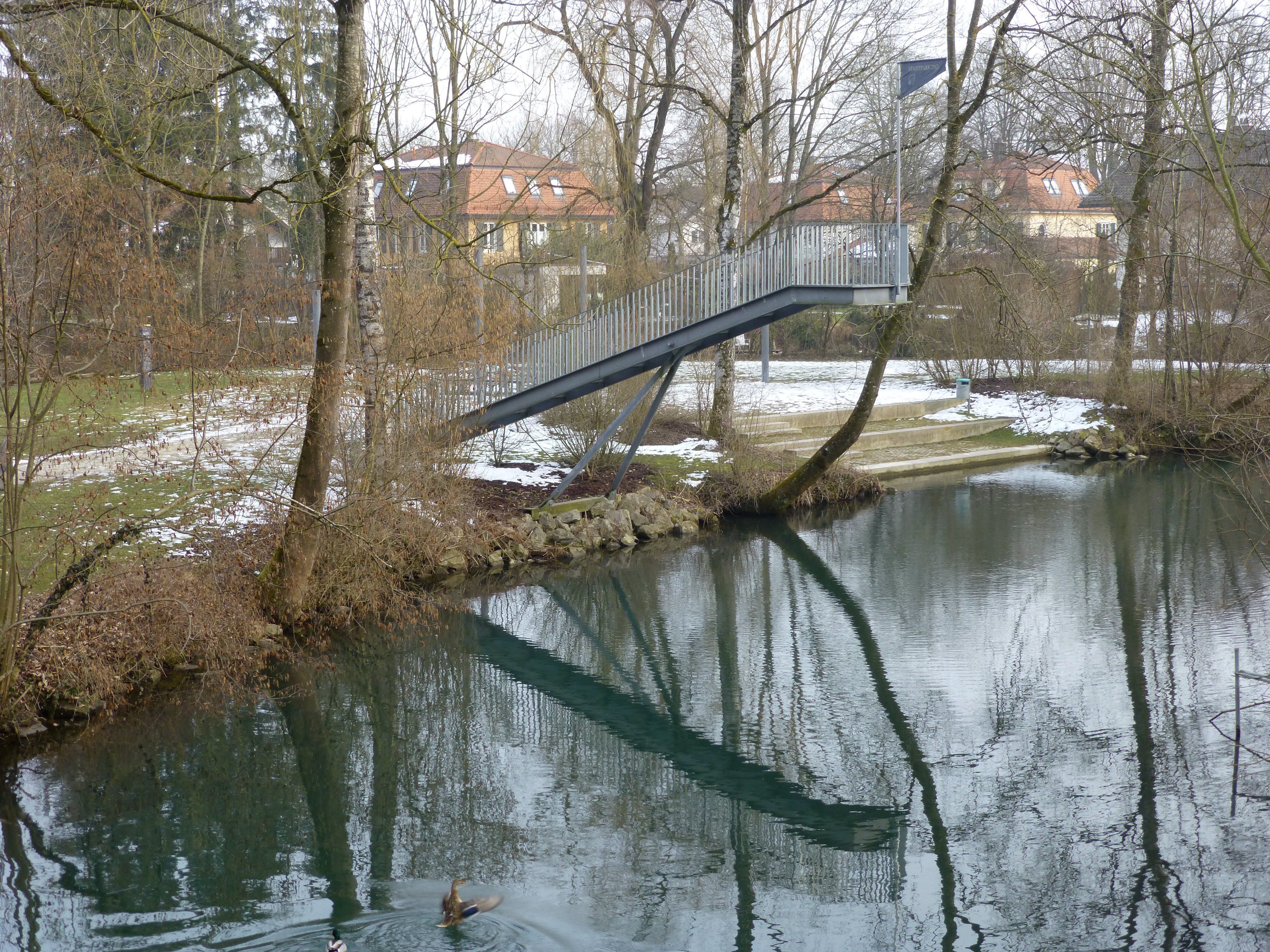 Die „Himmelsleiter“ im Erdinger Stadtpark am Ufer der Sempt